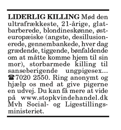 Annoncekampagne mod kvindehandel